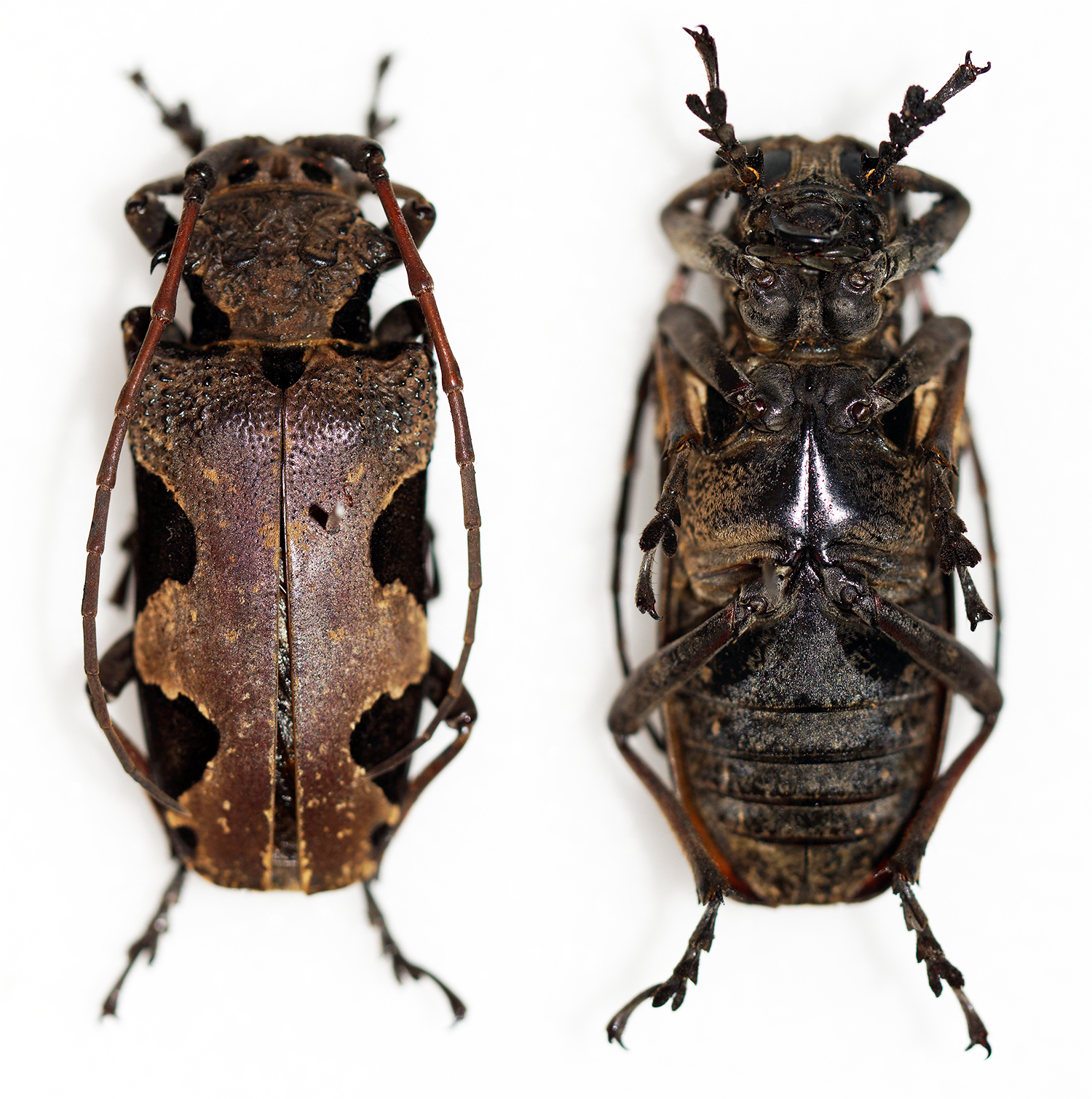 Aurivillius,1886 Sex: Male Data: 03-2013 - Kenya Size: ?